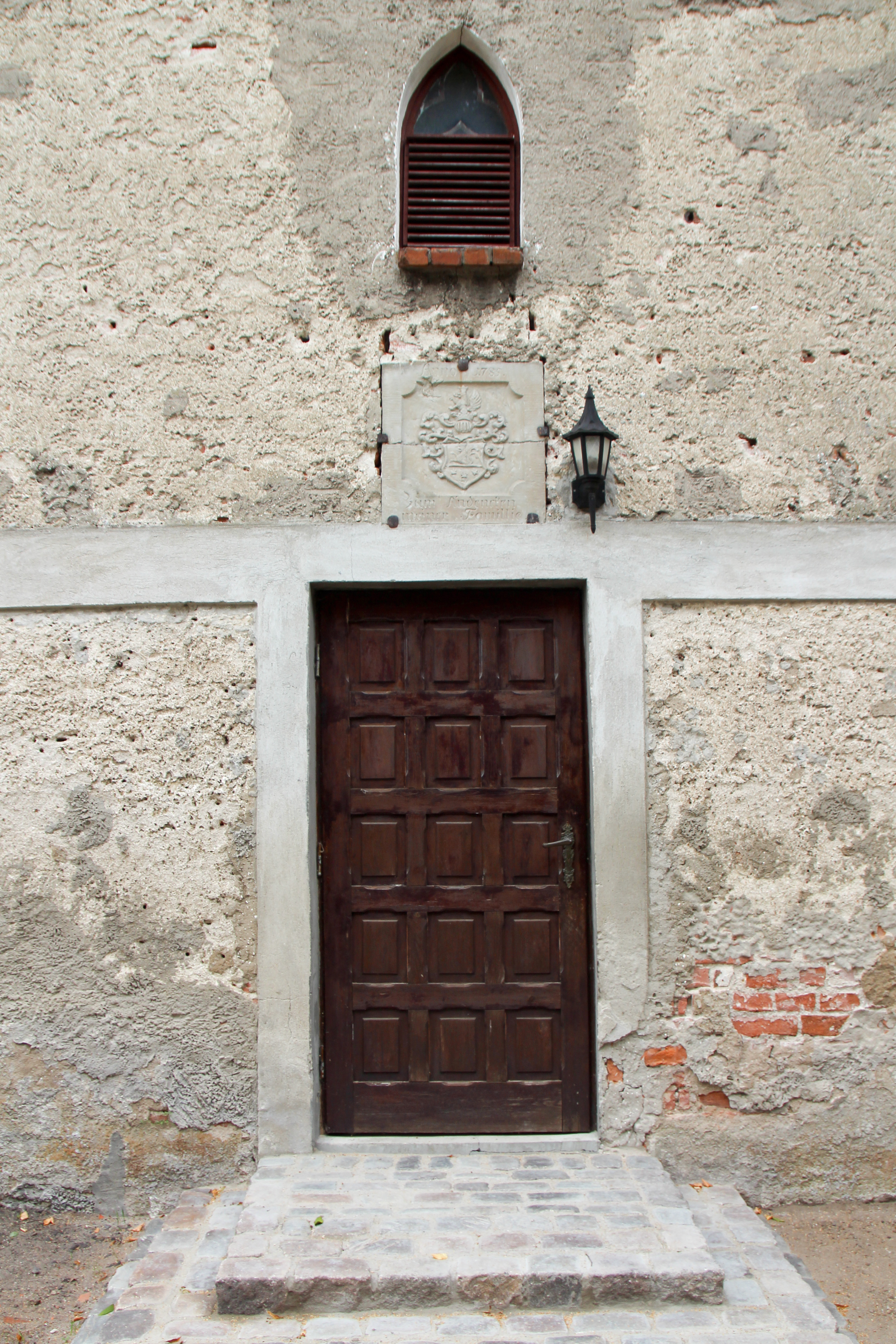 Sątoczno - wieś w Polsce położona w województwie warmińsko-mazurskim, w powiecie kętrzyńskim, w gminie Korsze.